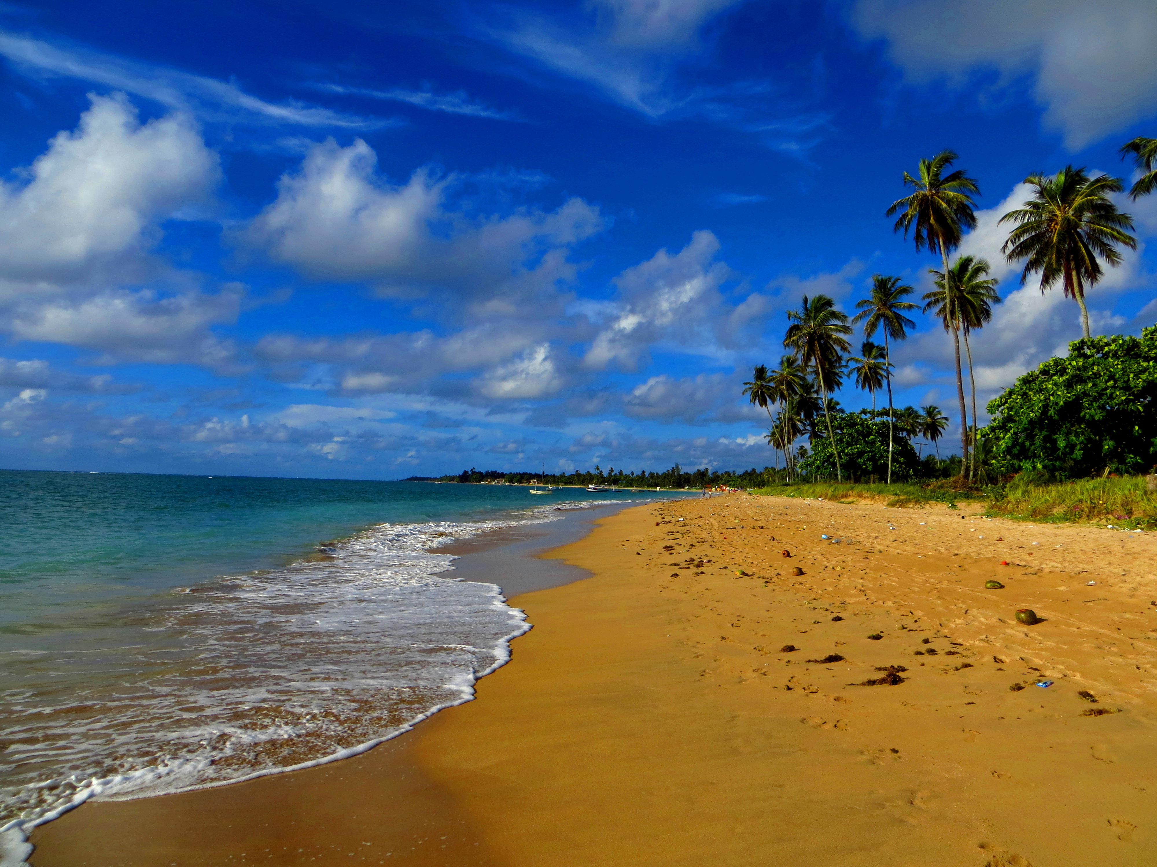 Descrição_para_sua_foto